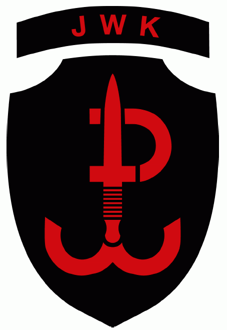 Jednostka Wojskowa Komandosów – oznaka rozpoznawcza na mundur wyjściowy – 2014, Polska.